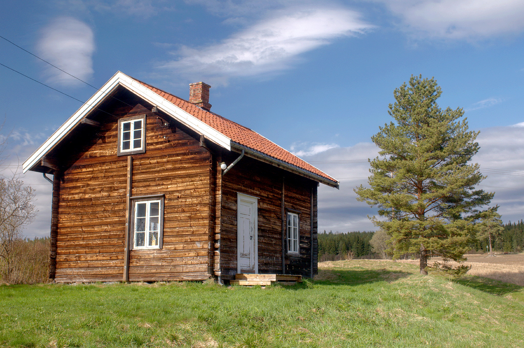 Møllerboligen ved Auli Mølle i Nes